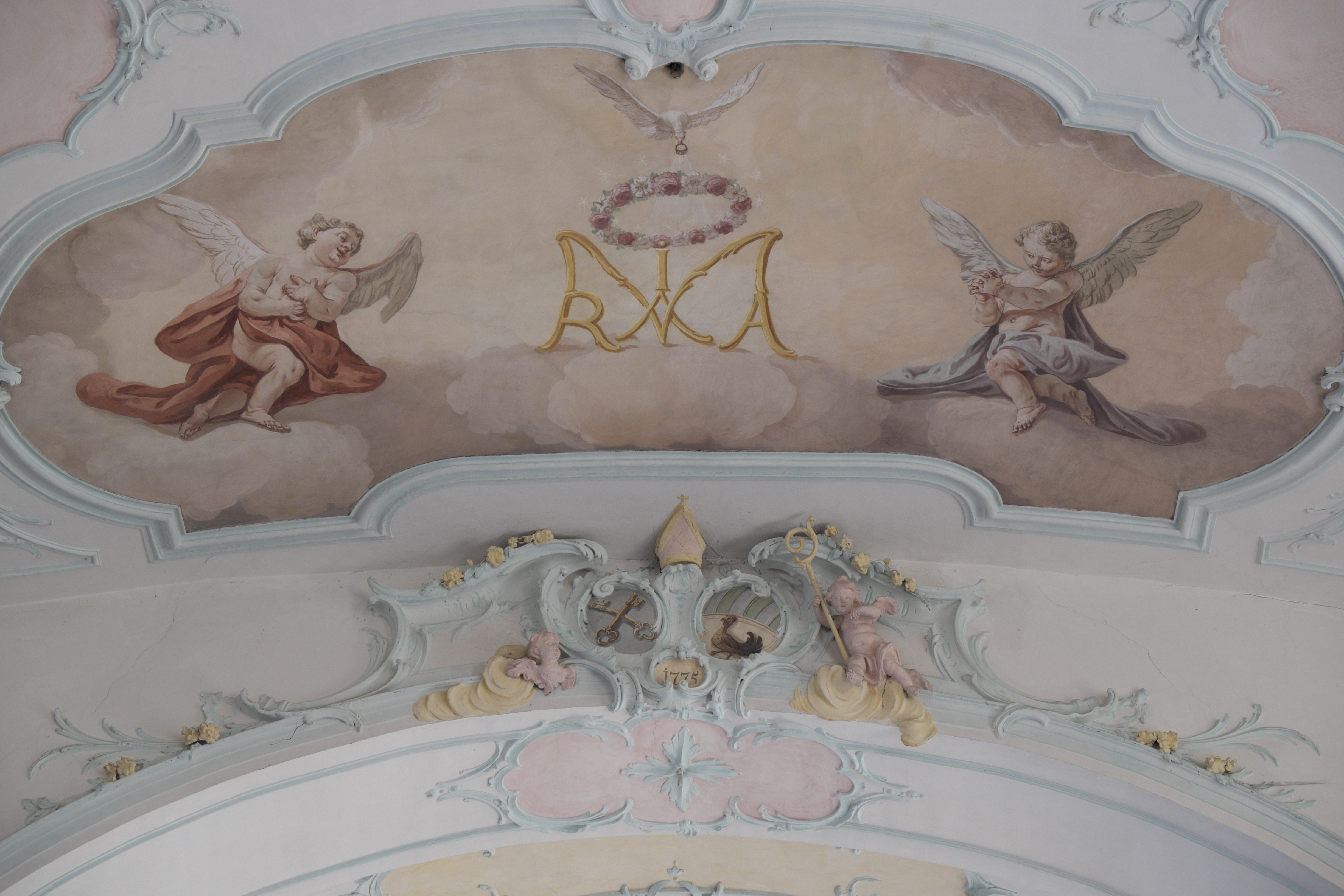 Katholische Pfarrkirche St. Sixtus in Moorenweis im Landkreis Fürstenfeldbruck (Bayern/Deutschland), Fresko von Matthäus Günther im Langhaus, von 1775; Darstellung: Engel; Stuck am Chorbogen mit dem Wappen des Abtes Engelbert Goggl, Marienmonogramm; Deckenstuck von Tassilo Zöpf, von 1775/76